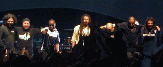 Foto show de O Rappa no Tom Brasil